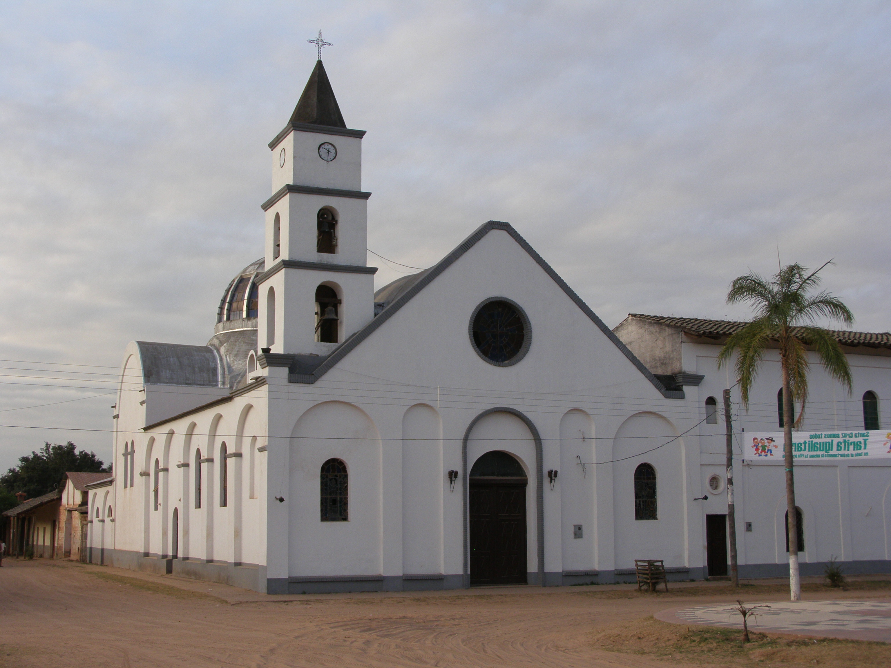 eigen werk